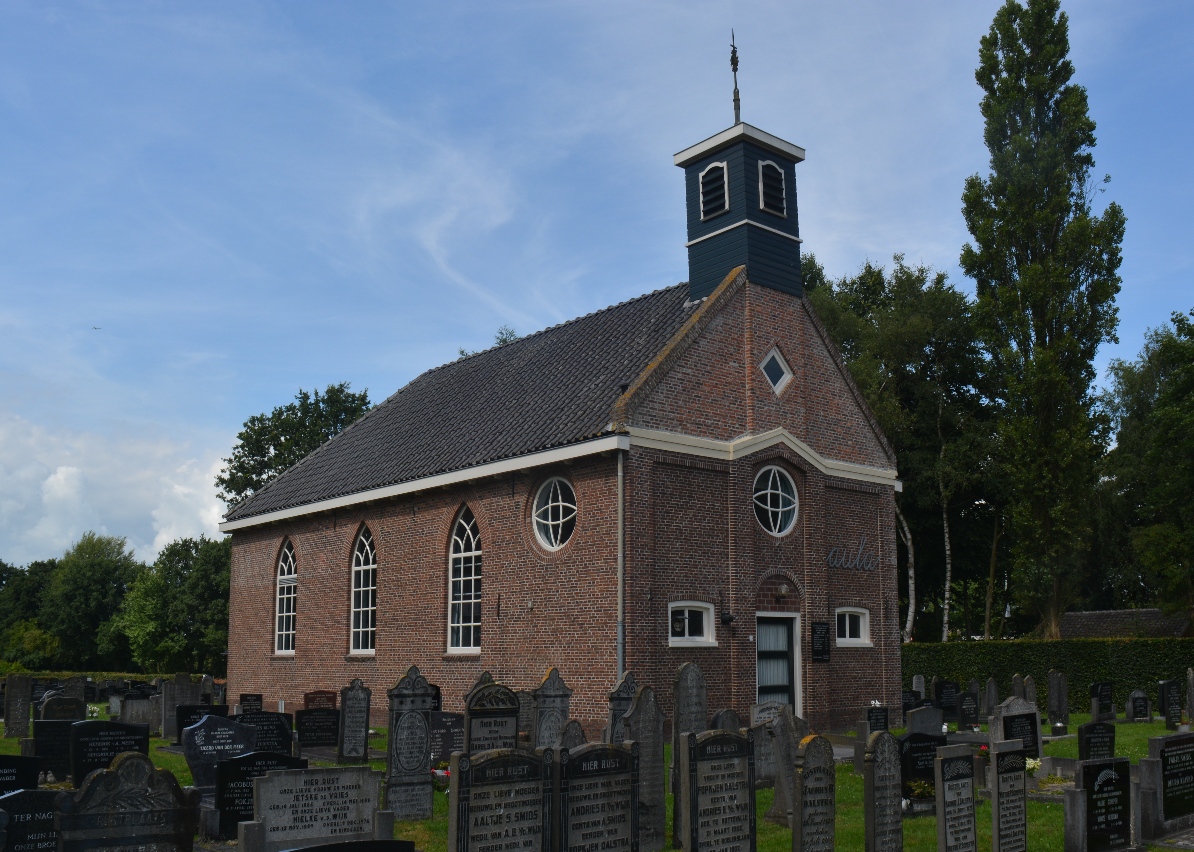 Boelenslaan, aula (voormalige hervormde kerk)